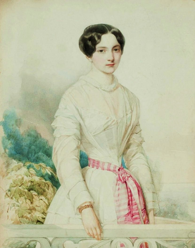 Графиня Юлия Маврикиевна Гауки (1825—1895)